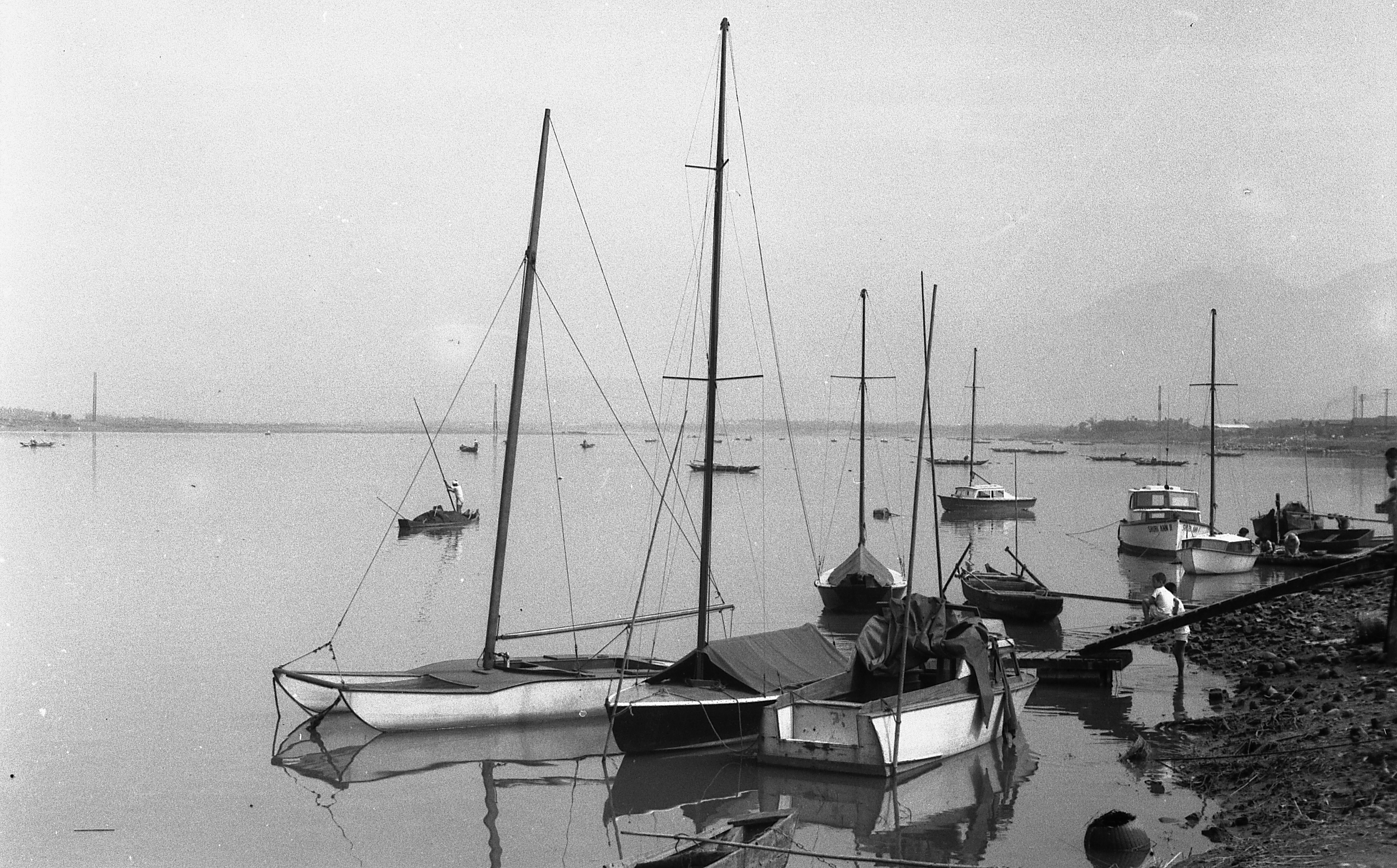 停靠在河邊的帆船，大稻埕水門附近。